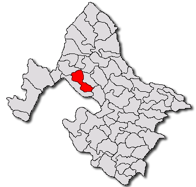 Categorie:Hărţi ale judeţului Mehedinţi